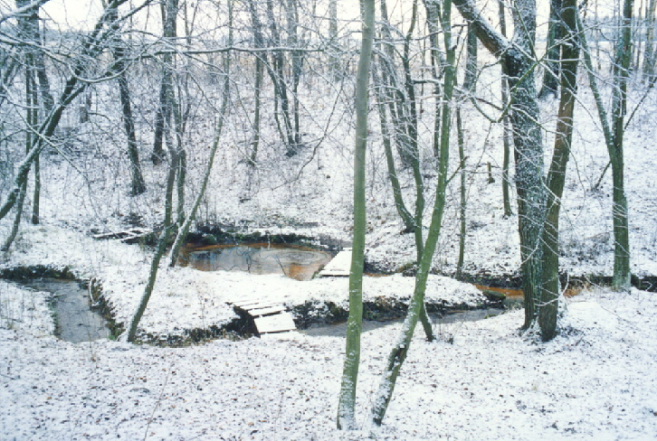 Truikinių šaltinis (Šmitos versmė; iš asmeninio archyvo)